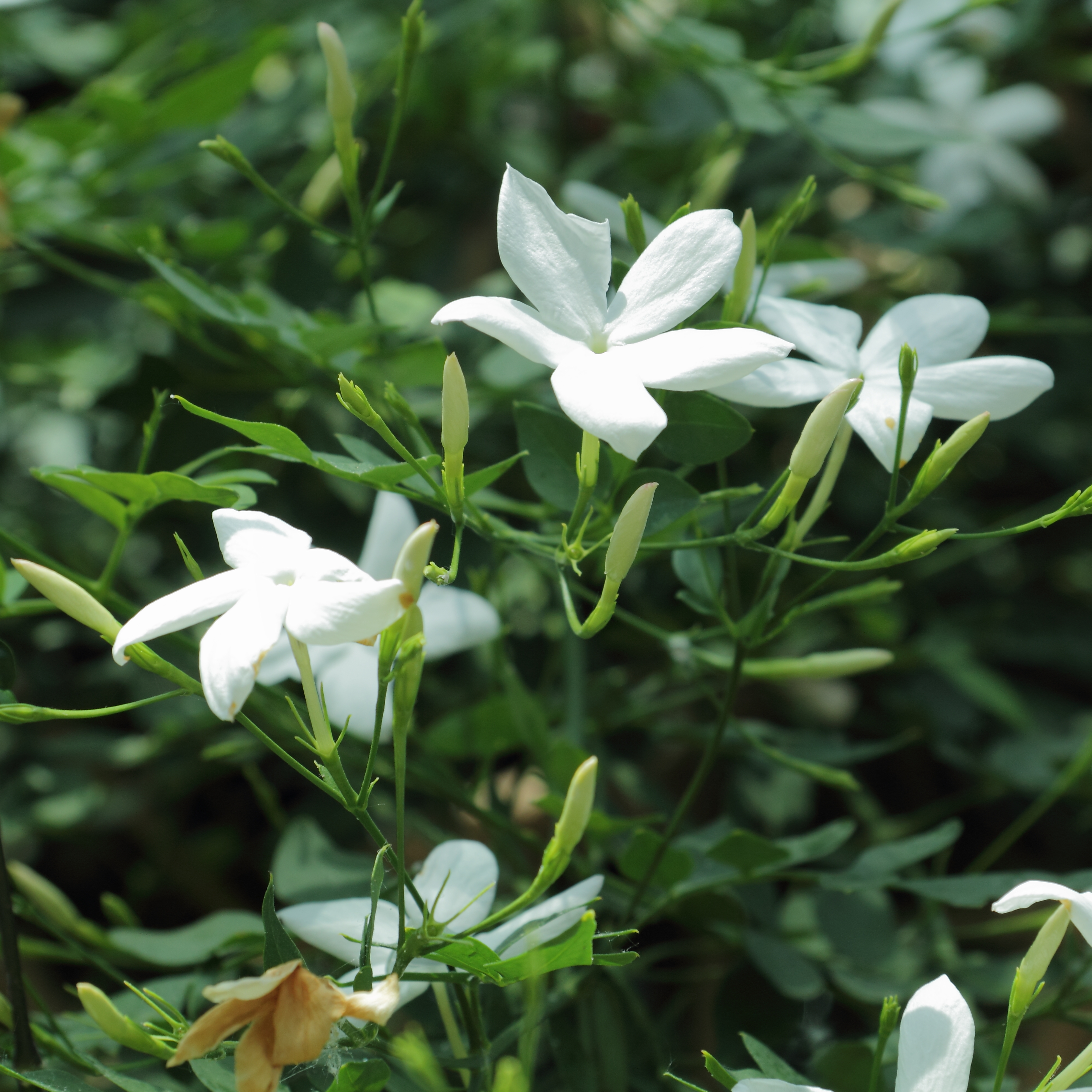 Jasminum officinale , identifierad med hjälp av befintlig skylt vid Bergianska trädgården.